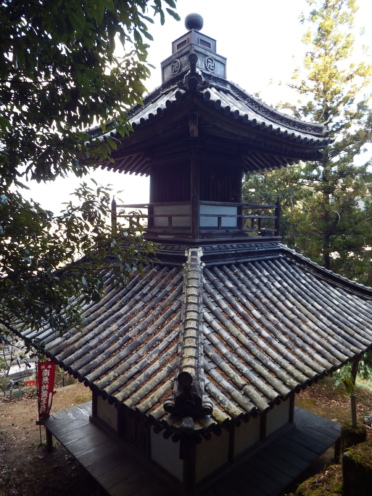 明王院の多宝塔